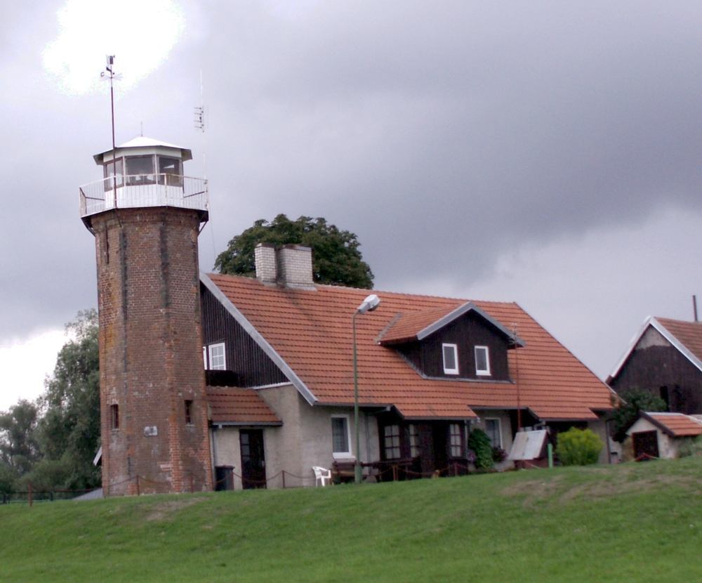 Uostadvario švyturys